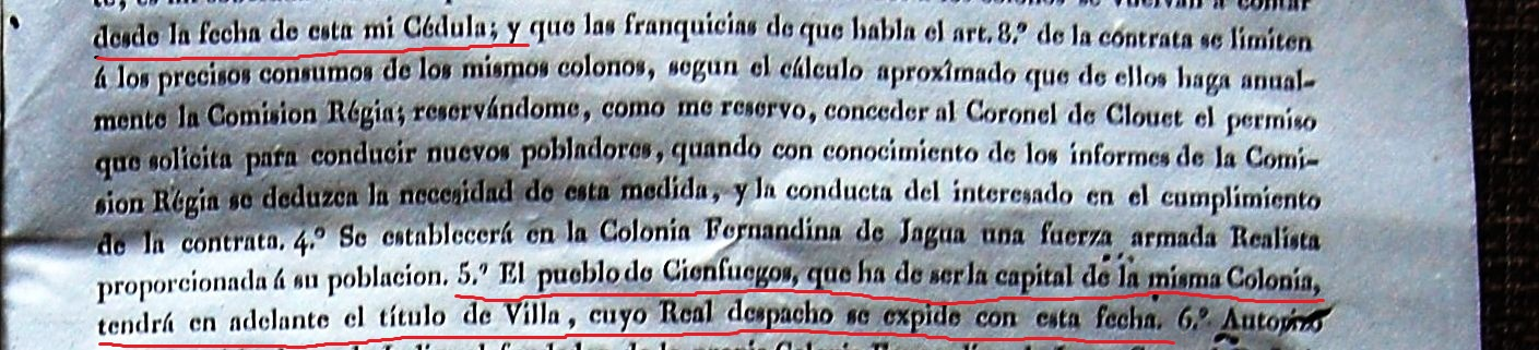 Real Despacho del 20 de mayo de 1829 mediante el cual el rey le concedió el título de villa y le dio el nombre de Cienfuegos en honor de don José Cienfuegos, capitán general de la isla.